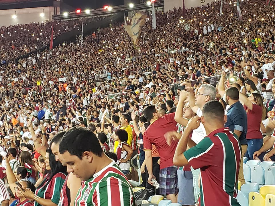 Torcida do Fluminense no empate do clube por 0 a 0 em 4 de dezembro de 2019, perante 39.965 torcedores durante a partida.